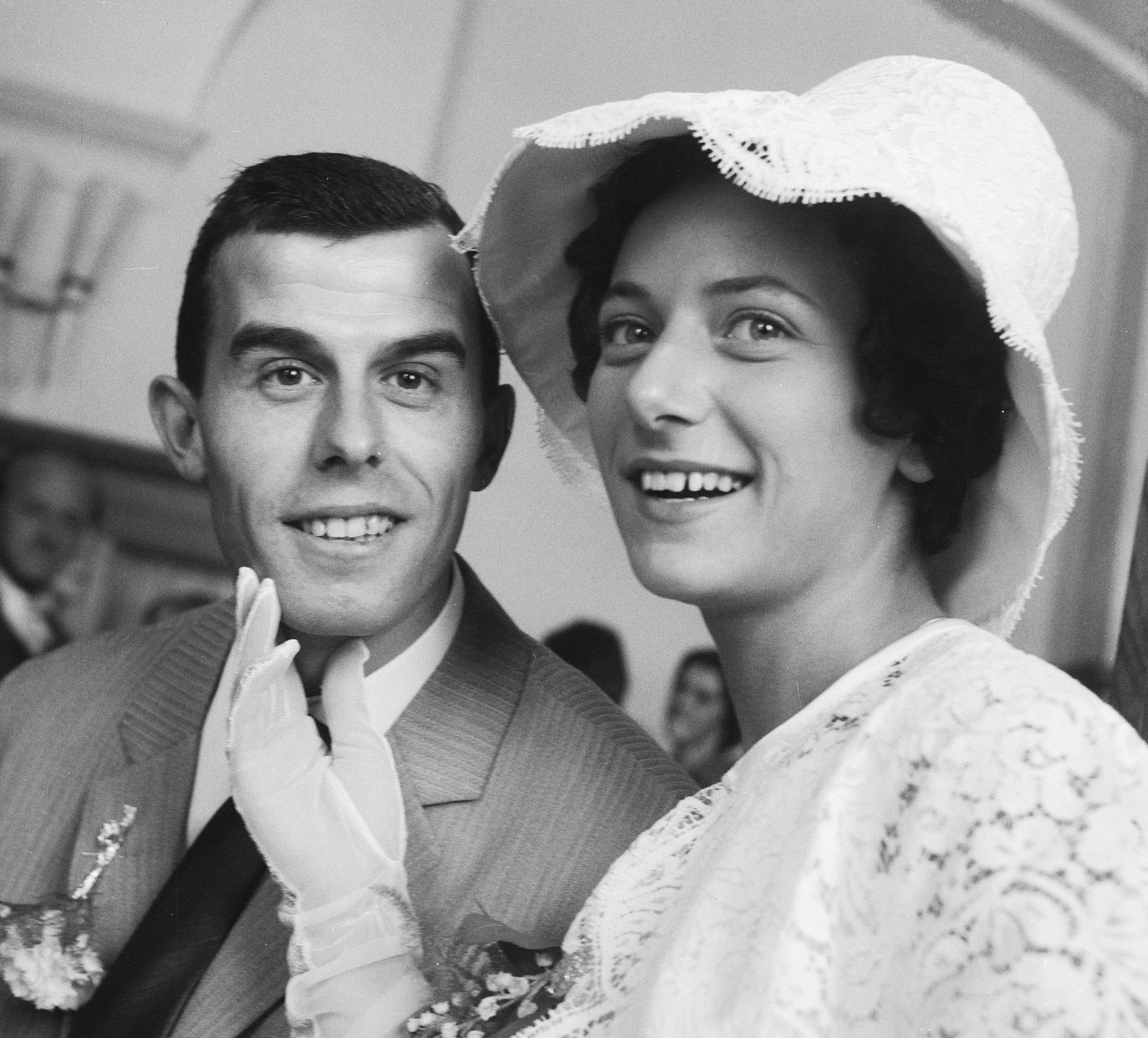 Huwelijk Coen Moulijn